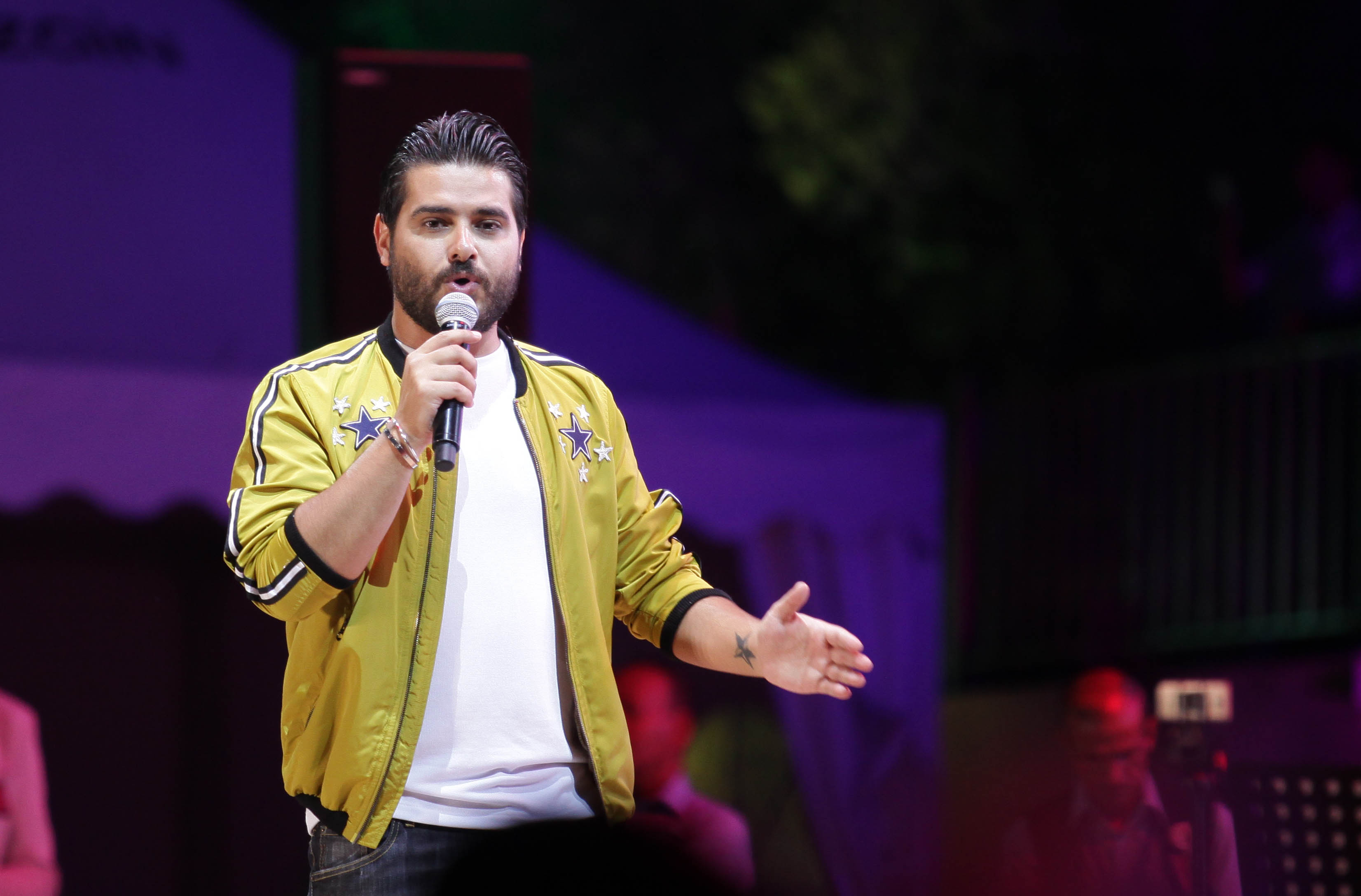 مهرجان الفحيص حفلة ناصيف زيتون 2018 تصوير أحمد عبده جريدة الدستور الأردنية, Addustour, Jordan Press & Publicatioon Co.